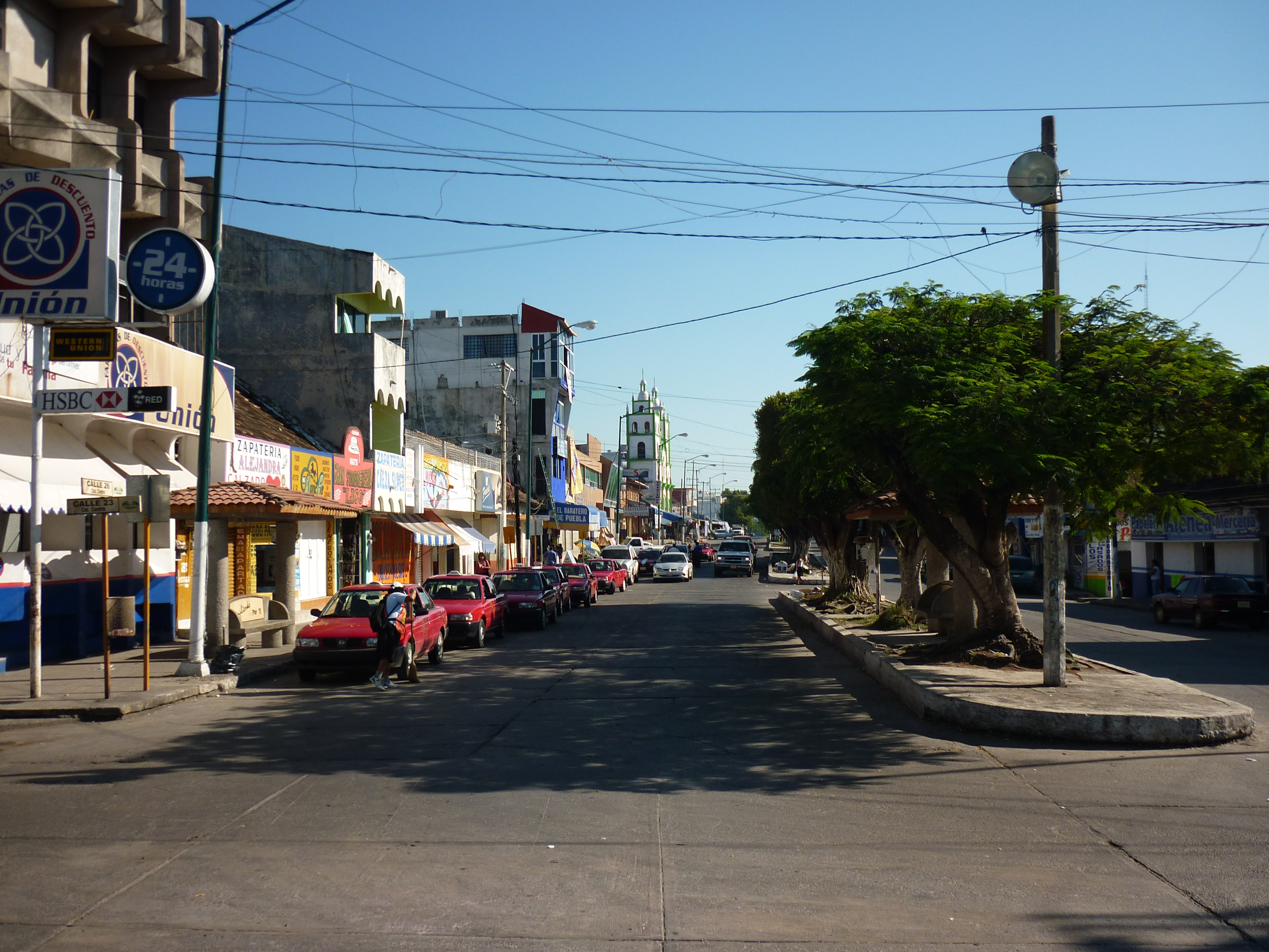 Calle principal de la ciudad de Tenosique, Tabasco